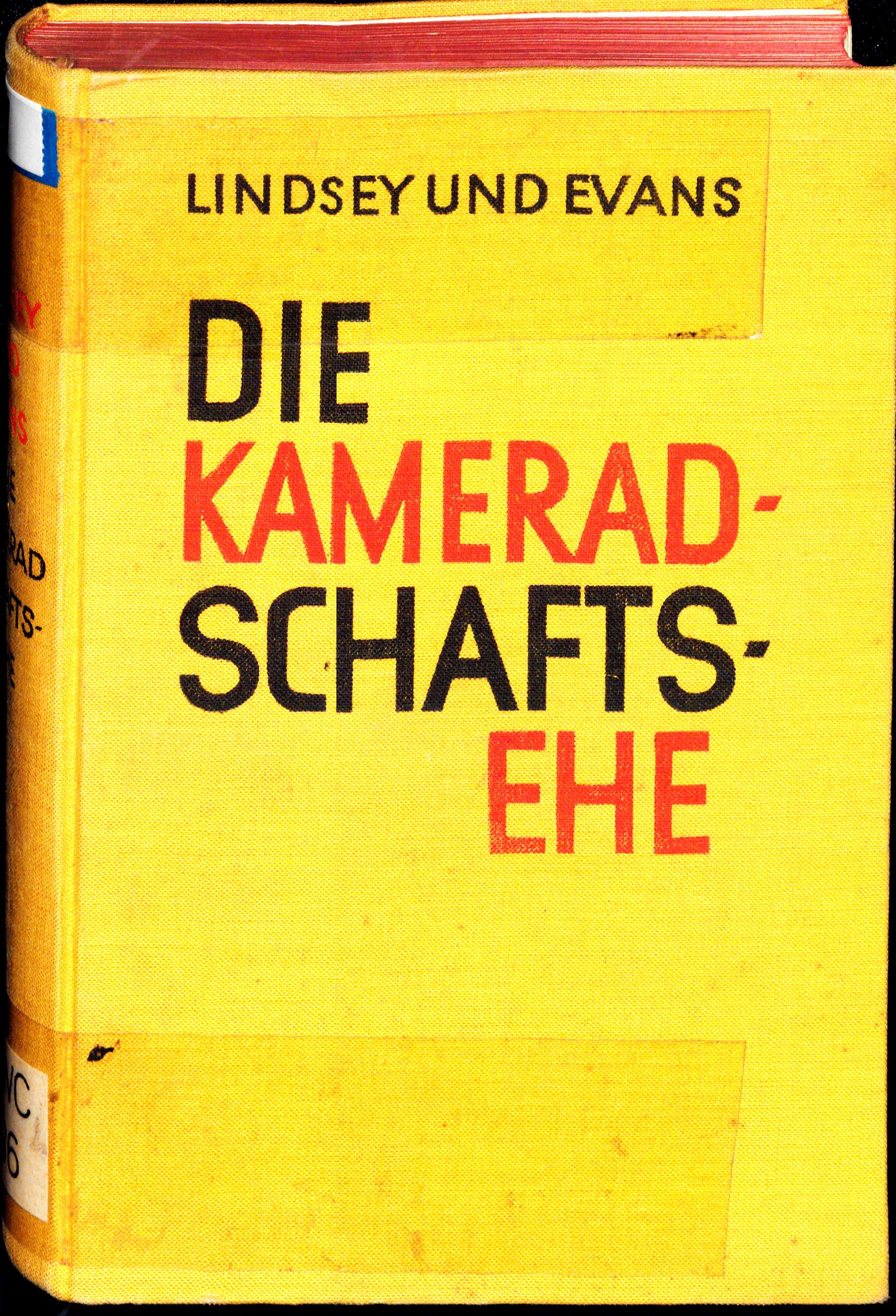 Ben B. Lindsey; Wainwright Evans: Die Kameradschaftsehe 1928 Einband